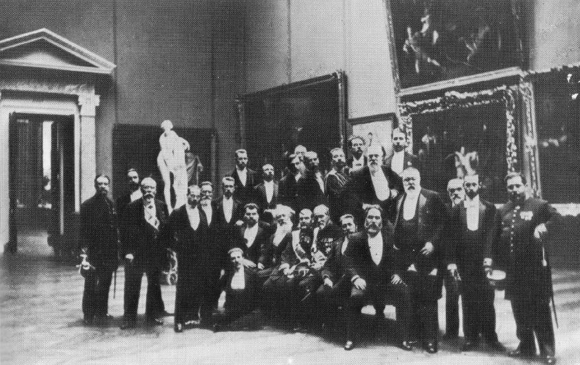 Торжественное открытие Русского музея. 7 (19) марта 1898. (Э.О.Визель второй справа)